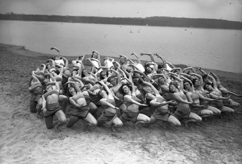 Die berühmte Laban-Tanzschule trainiert! Nach den modernsten Unterrichstmethoden werden die zukünftigen Tanzstars in der Labanschule ausgebildet. Unsere Bilder zeigen eine Morgenübung der berühmten Tanzschule Laban im Strandbad Wannsee bei Berlin. Eine Szene aus einem ausdrucksvollen Tanz von Schülerinnen Laban-Tanzschule am Strande in Wannsee.